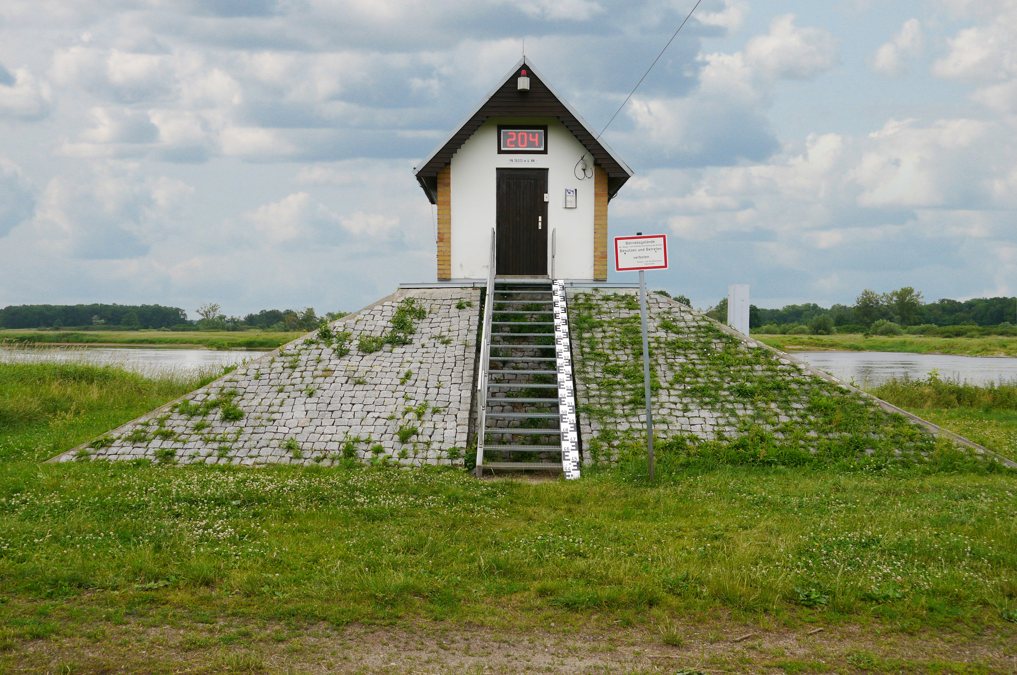 Pegelhaus Ratzdorf an der Mündung der Neiße in die Oder. Es dient zur Messung des aktuellen Wasserstandes der Oder und nutzt damit der Schifffahrt.